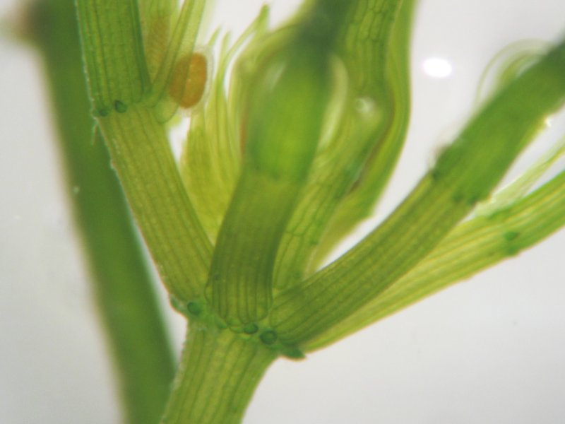 Feine Armleuchteralge Chara delicatula, triplostiche Berindung, Müritz-Gebiet